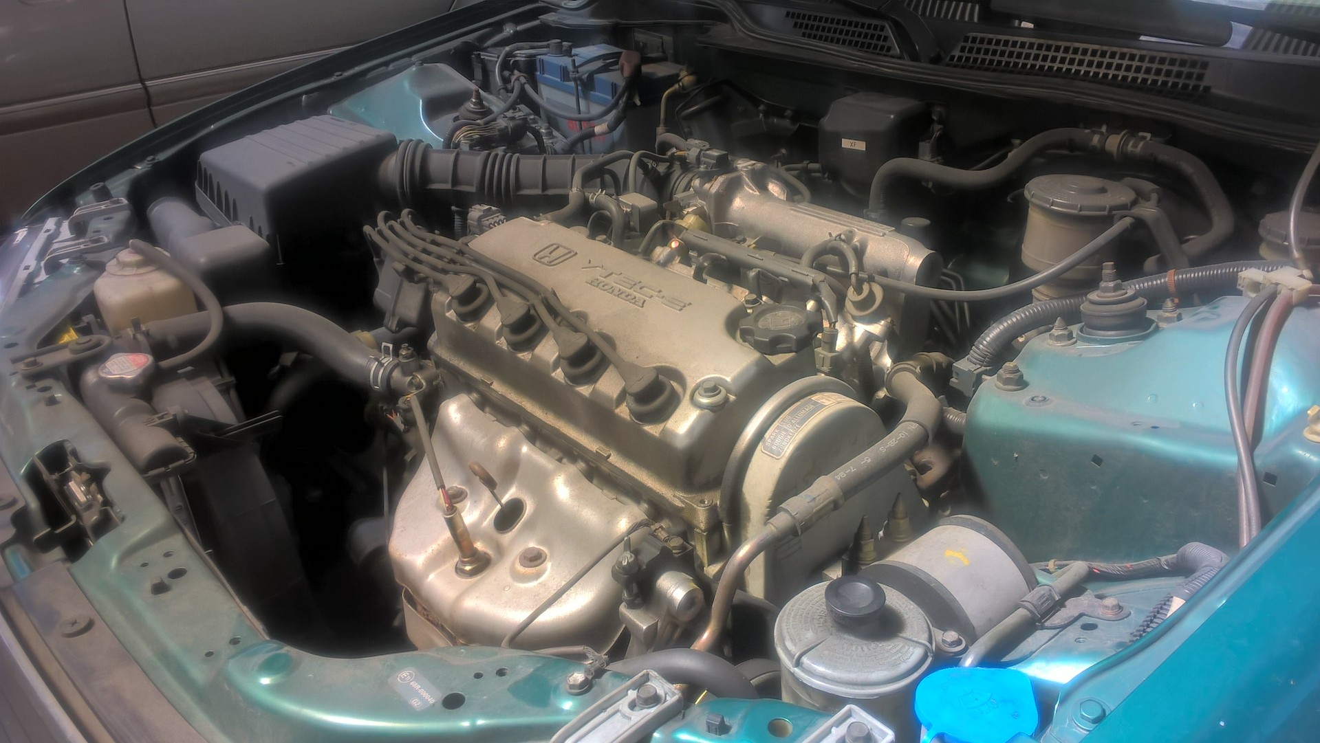 Motor D15Z3 de 1995, de la casa Honda diseñado para incluirse en los Honda Civics de sexta generación, concretamente los MA9. Este motor entregaba 90 cv de potencia.